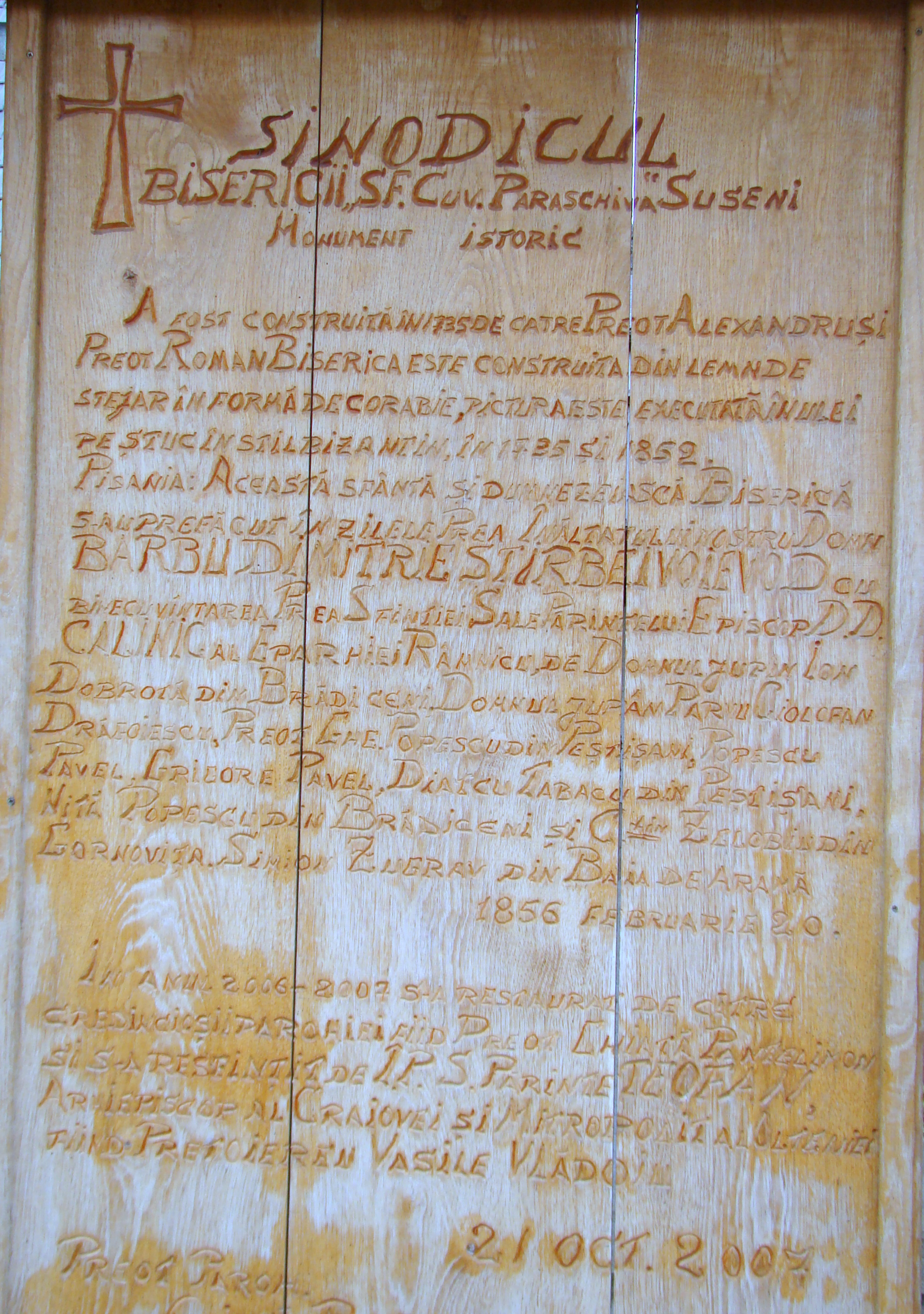 Biserica de lemn „Cuvioasa Paraschiva” din Peștișani, județul Gorj